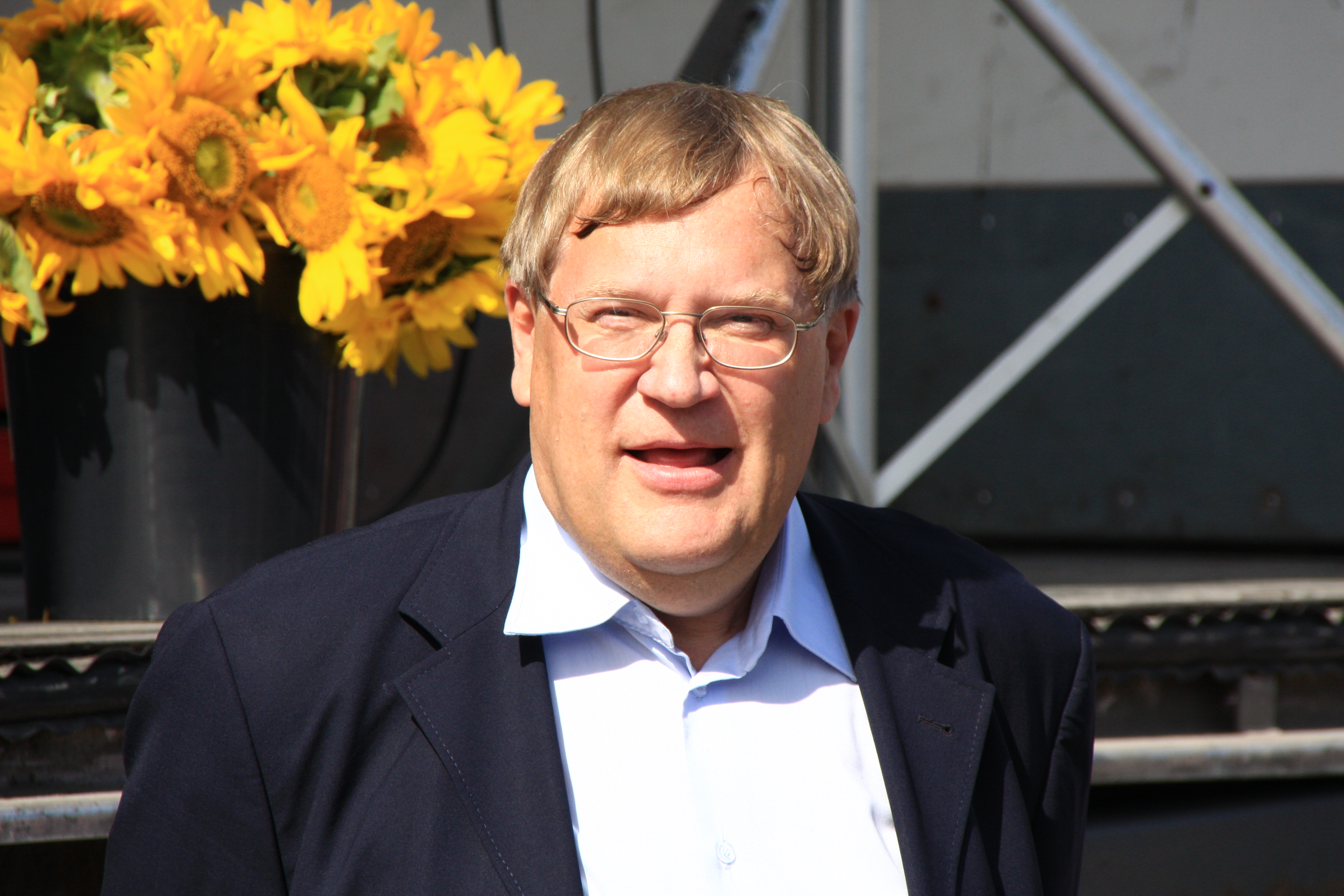 Esko Kiviranta suomalainen kansanedustaja